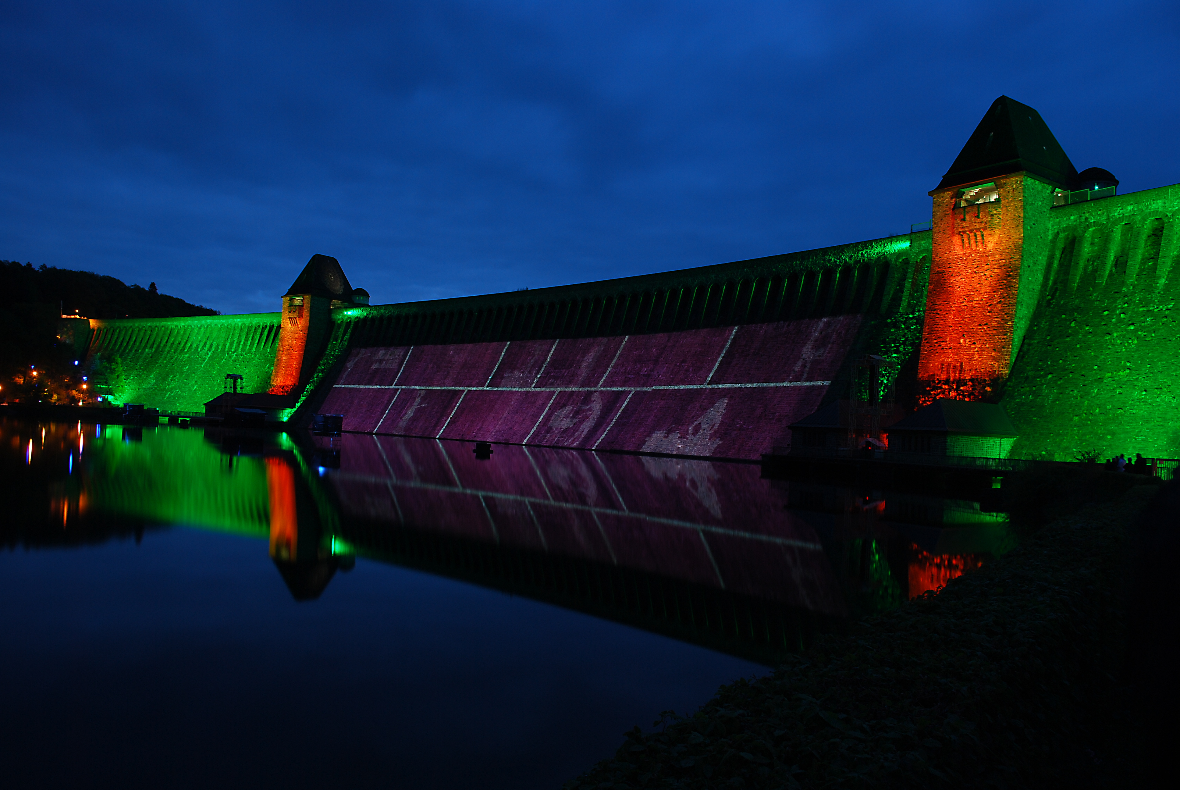 Jahrhundertleuchten der Lichtkünstler Britta und Wolfgang Flammersfeld an der Staumauer der Möhnetalsperre